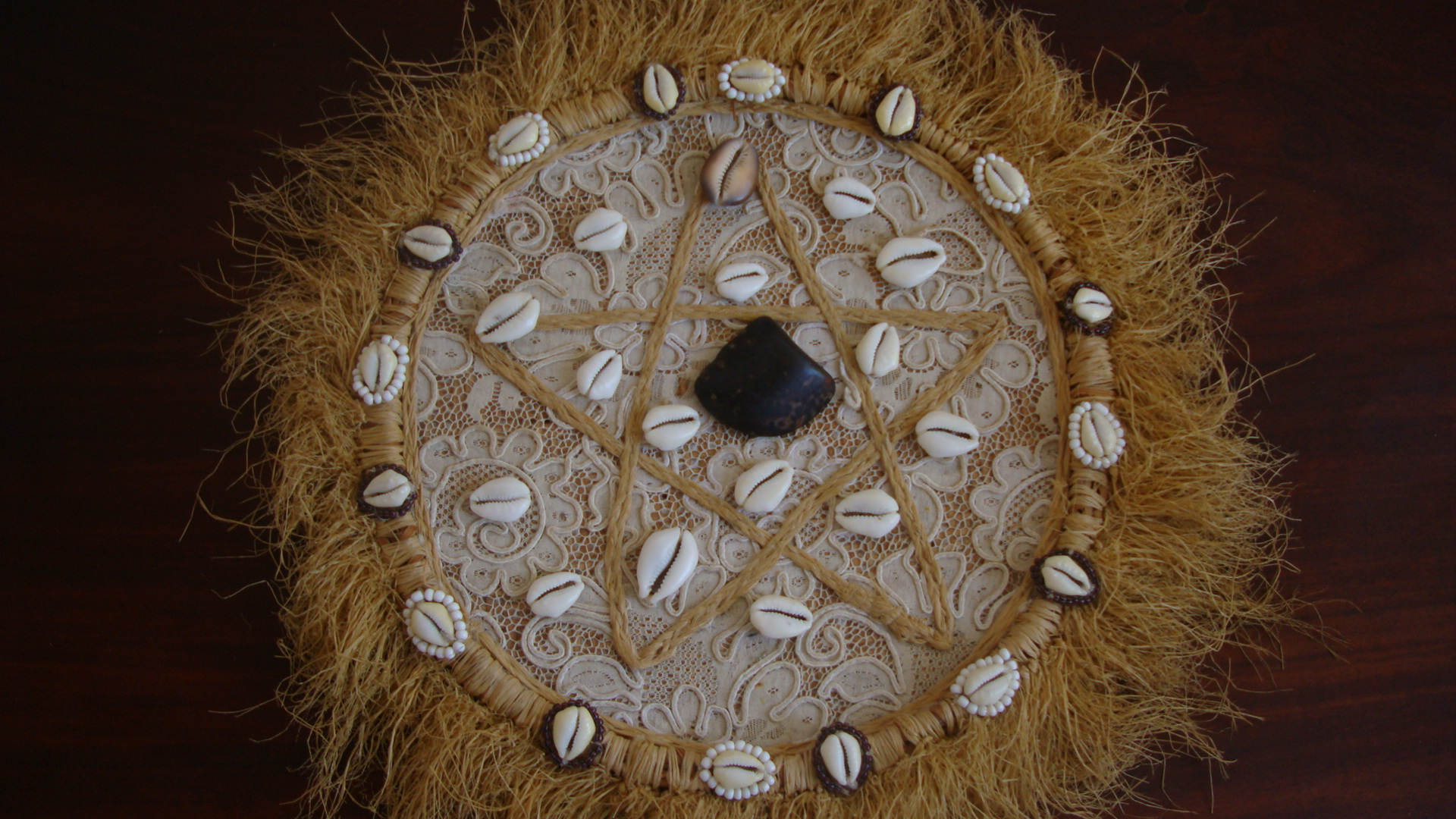 Odu Êjibé ou Alafia Merindilogun, Salvador, Bahia, Brasil.